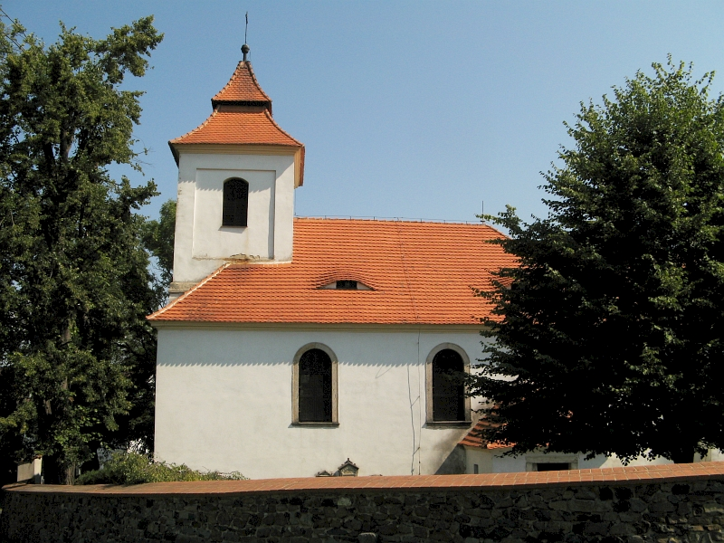 Kostel Všech svatých (Arnultovice), Arnultovice, Arnultovice (Velké Chvojno).